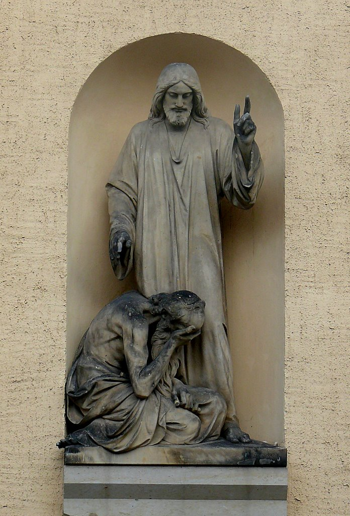 Figurengruppe über dem Turmportal der Marienkirche in Leipzig-Stötteritz